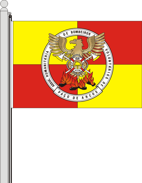 AHBVPA-Bandeira